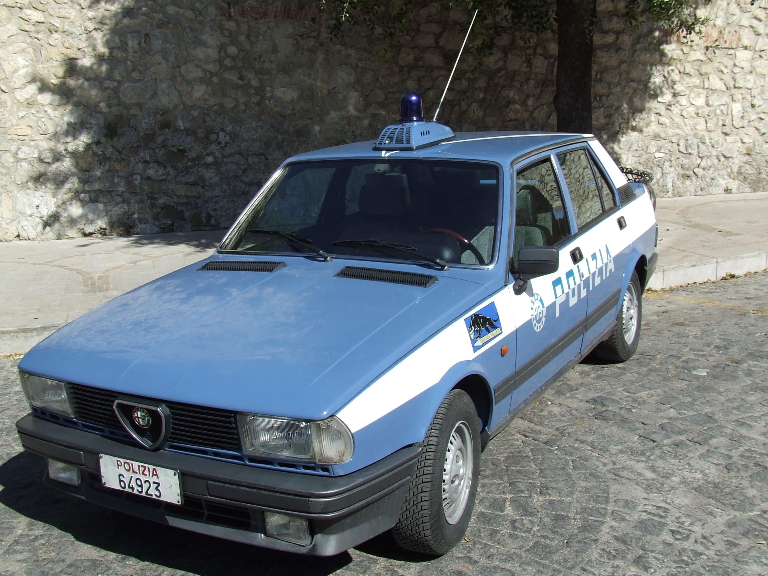 Alfa Romeo Giulietta (Polizia di Stato)